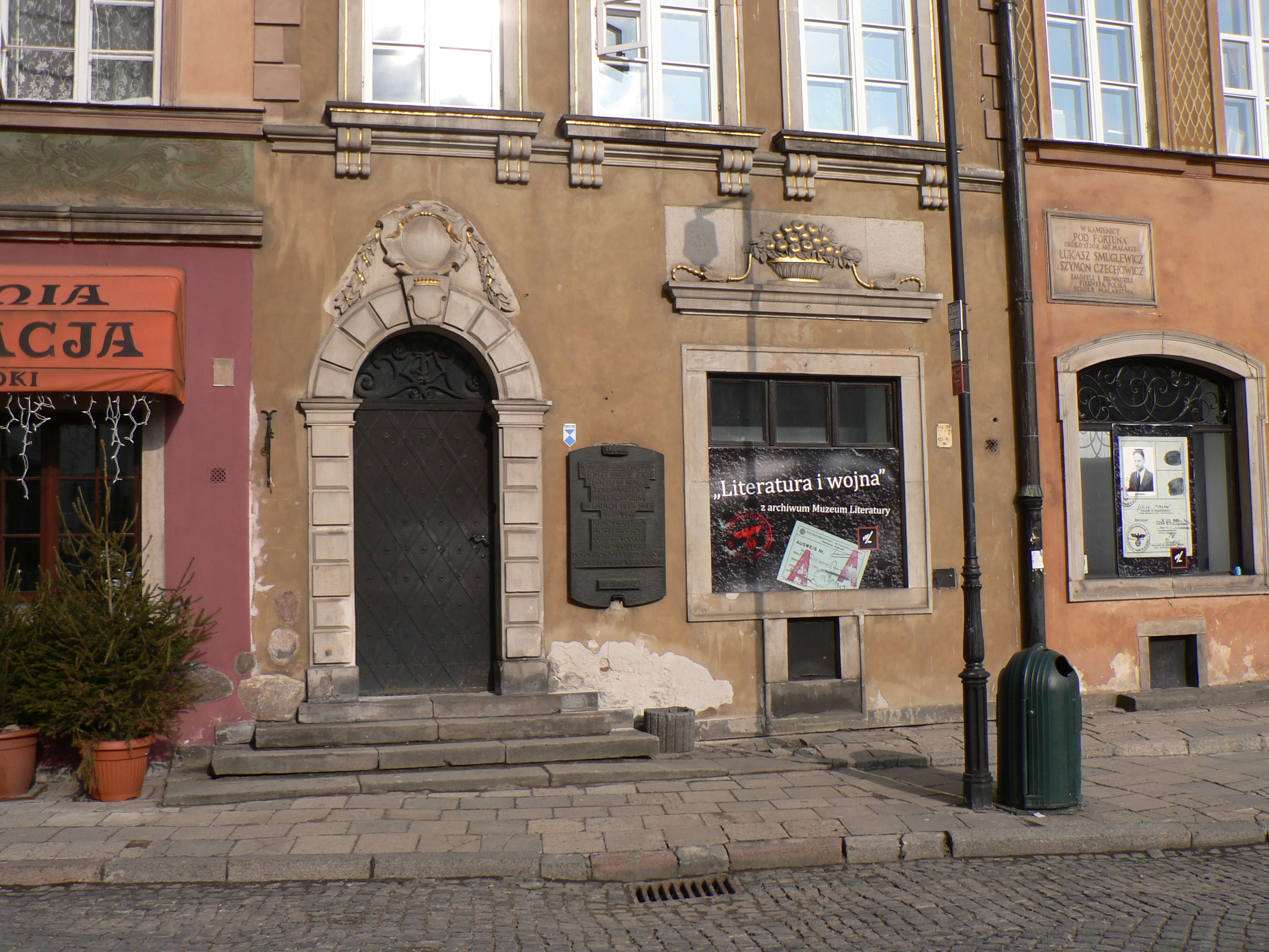 Rynek Starego Miasta, strona Barssa, Kamienica Busserowska